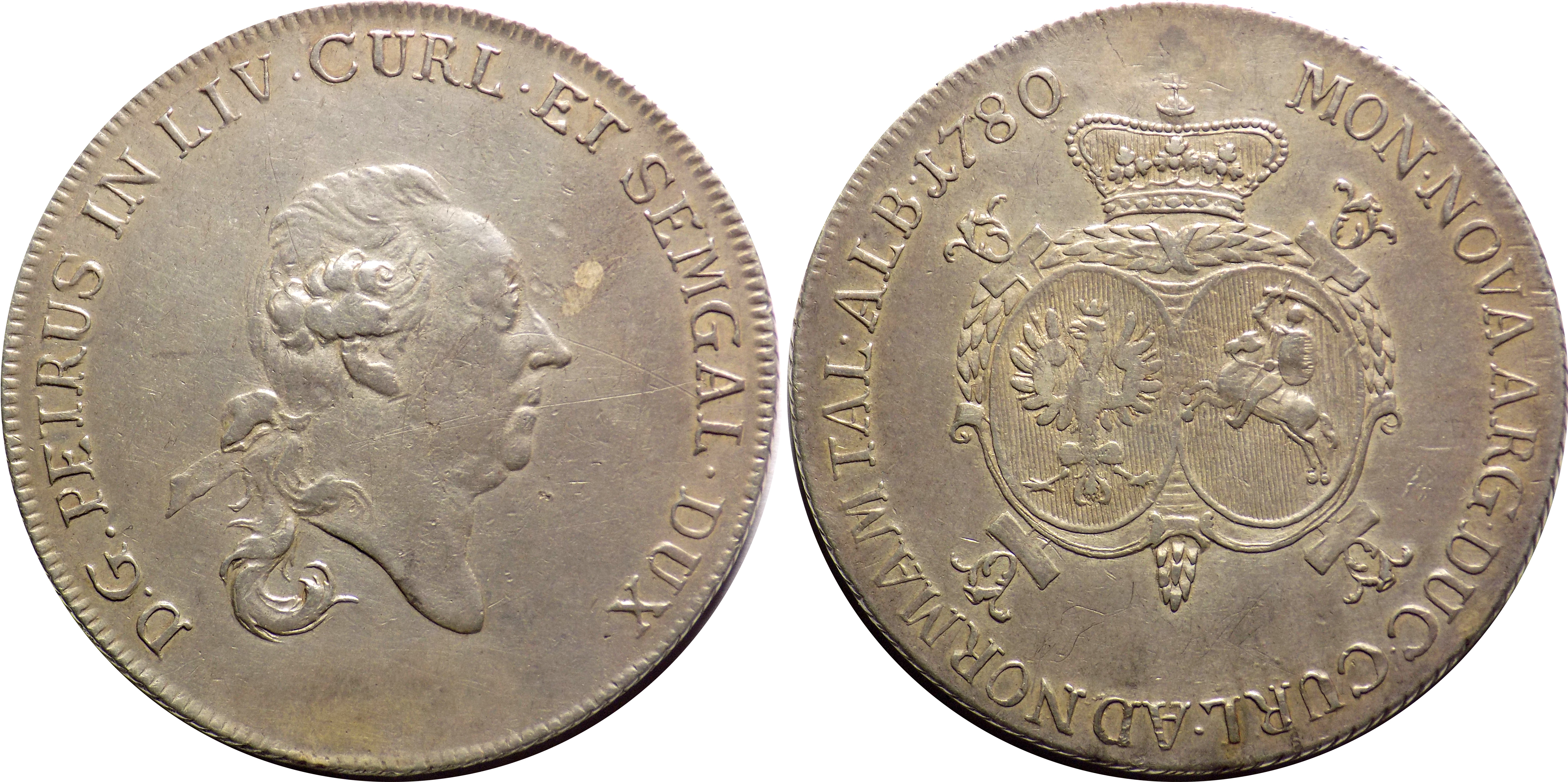 Talar kurlandzki 1780